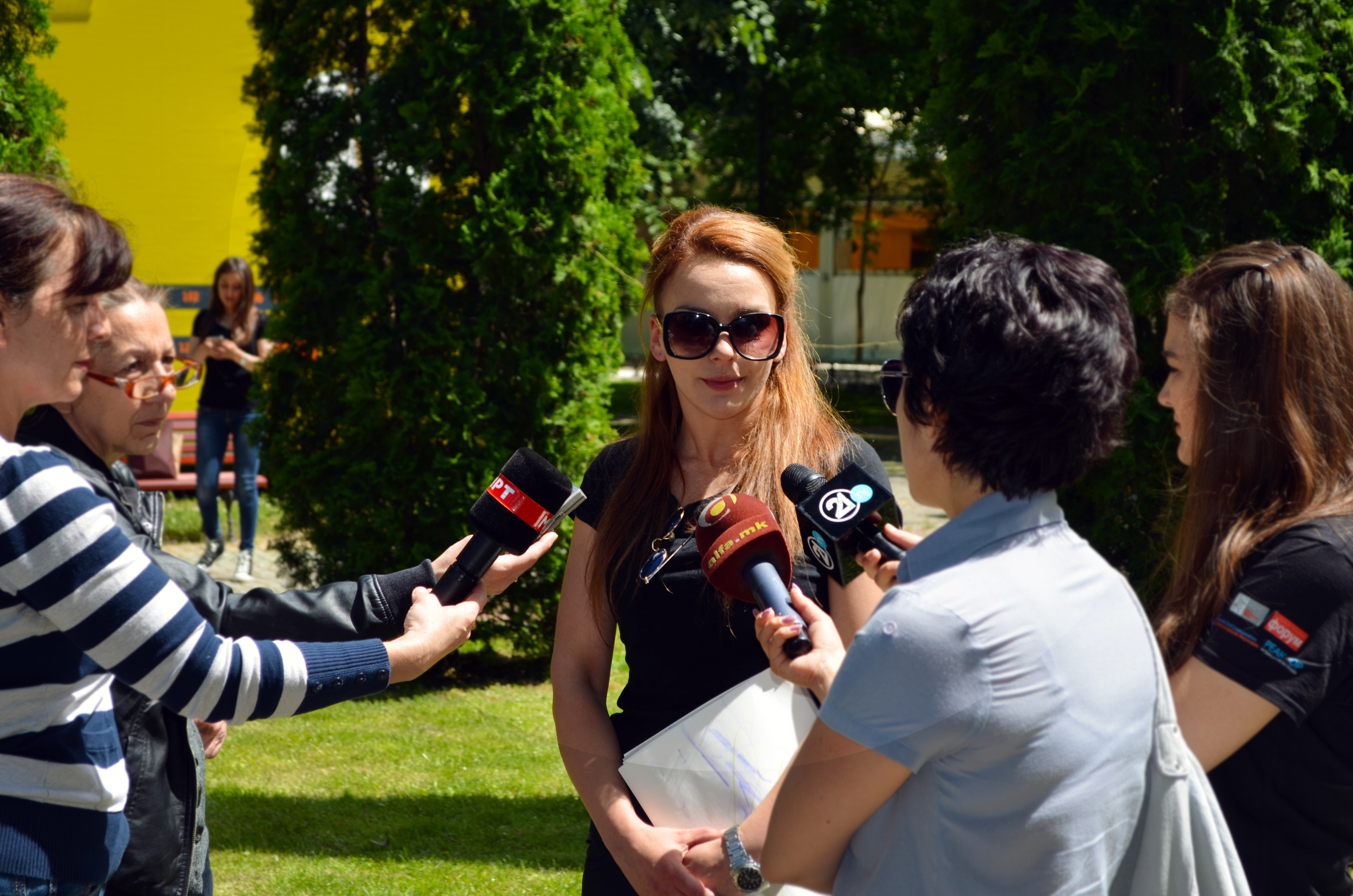 Srpskohrvatski / српскохрватски: Дороти Пачкова